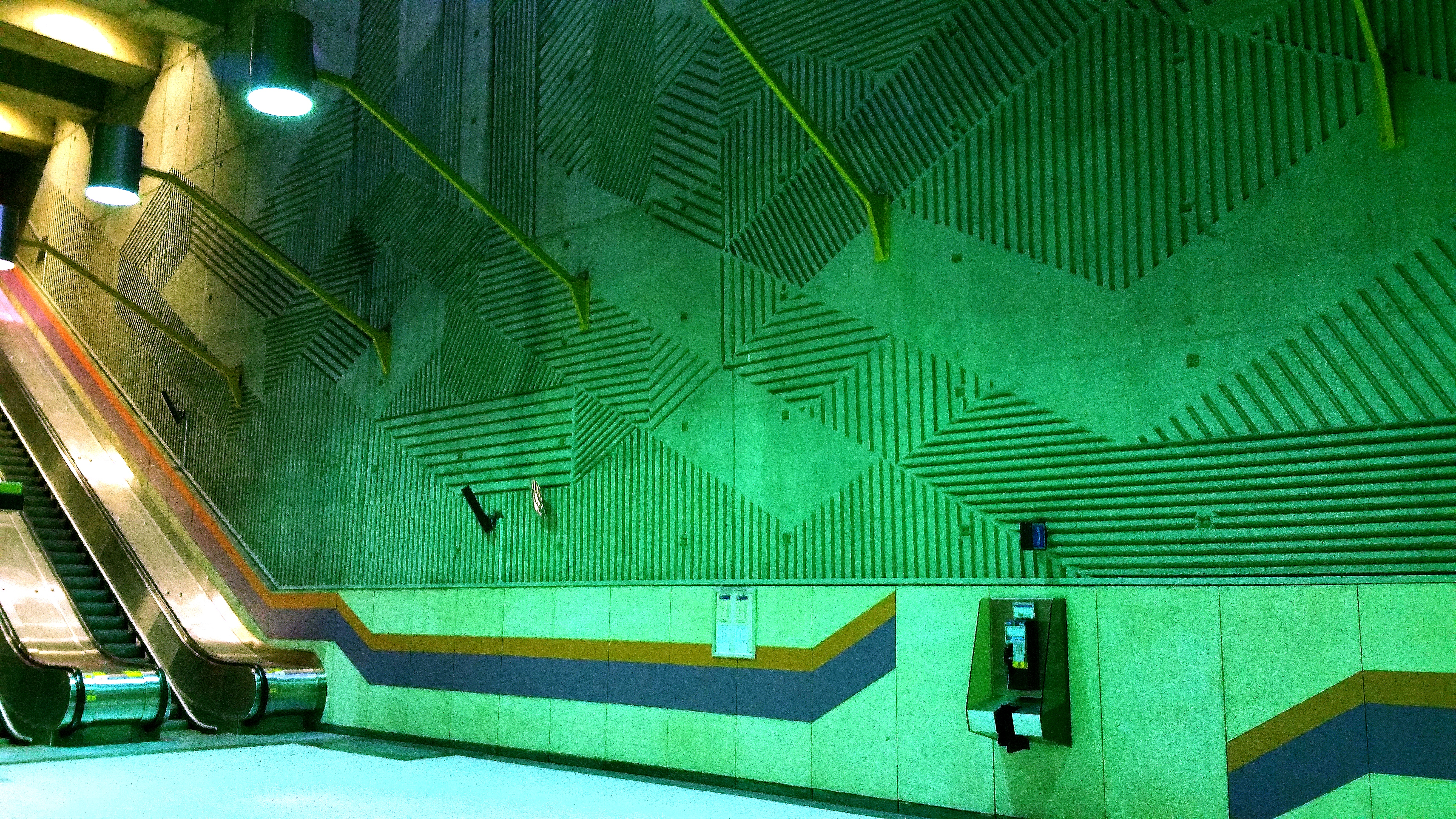 Bas-reliefs d'Antoine Lamarche dans la station Verdun du métro de Montréal